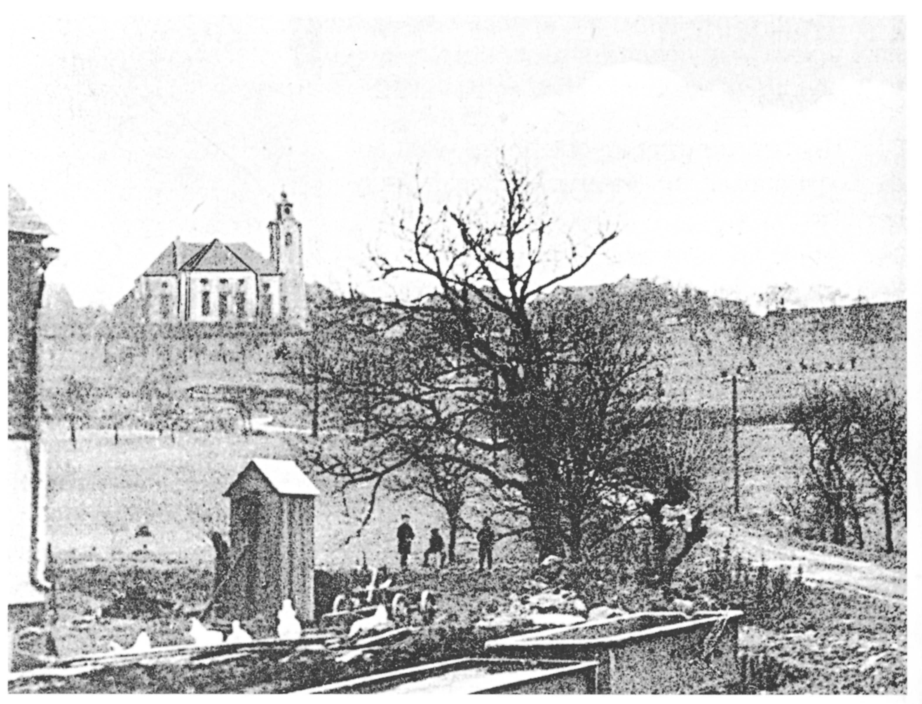 Evangelische Kirche Kleinich, man beachte im Vordergrund den Brunnentröge und die 1911 im Rahmen der Elektrifizierung gebauten Stromleitungen